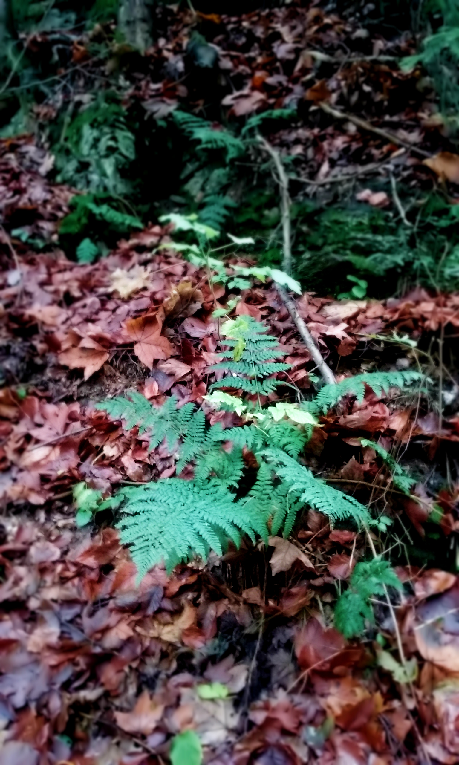 výskyt mnohých druhů kapradin